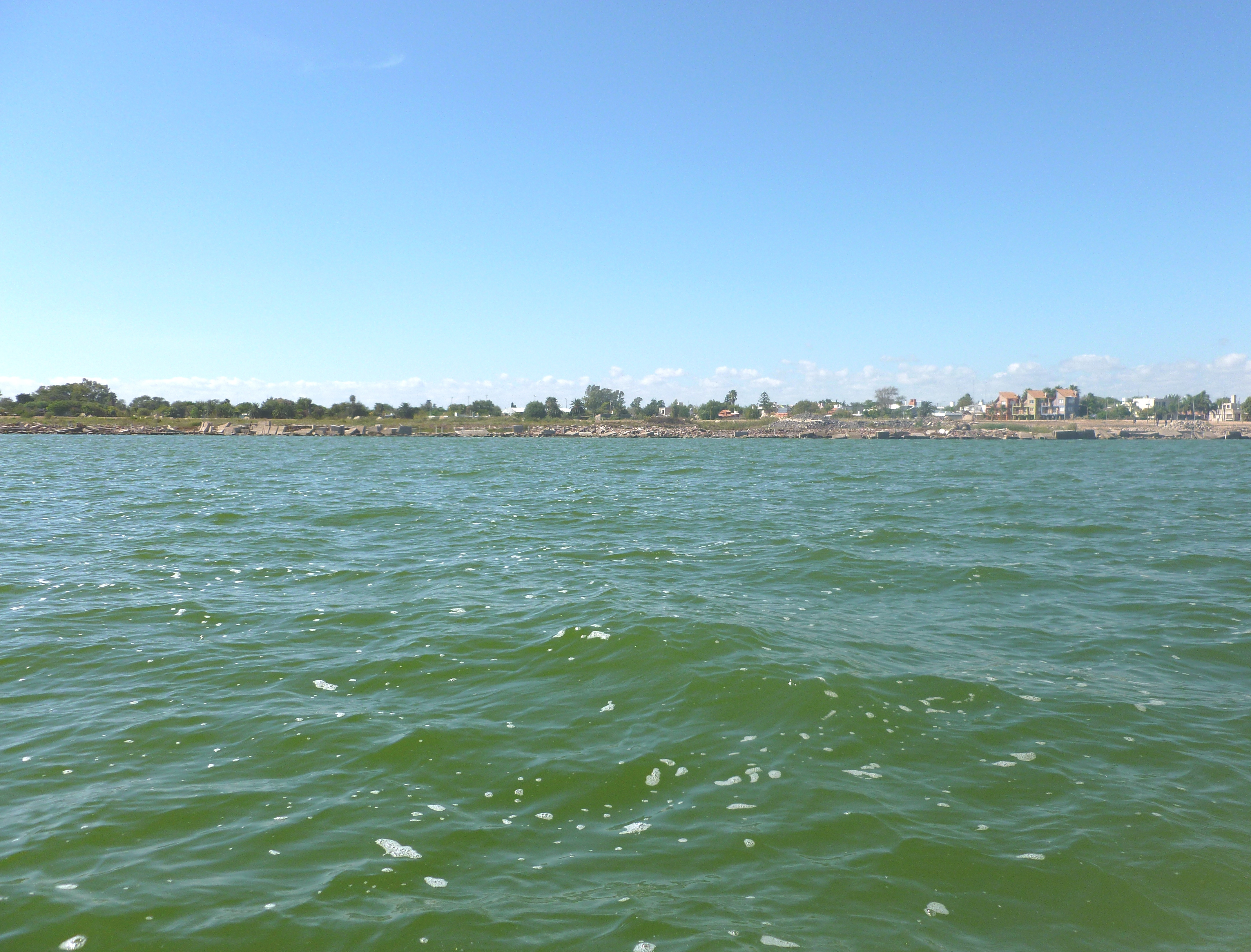 Vista de la Laguna en los Bañados del Rio Dulce y Laguna Mar Chiquita(Reserva Provincial de Cordoba-Argentina_Declarada sitio Ramsar